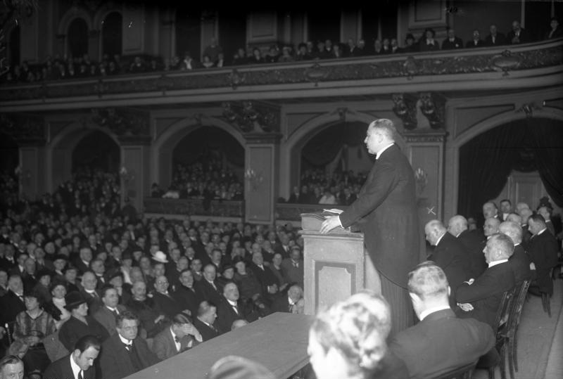 Der Beginn des Wahlkampfes für die Reichspräsidentenwahl. Dr. Jarres, der Kandidat des Rechtsblocks hielt seine erste Wahlrede am 18.3. vor Zehntausenden in der Philharmonie in Berlin. Dr. Jarres bei seiner Rede in der Philharmonie. Hinter ihm mit x der Reichsaußenminister Dr. [Gustav] Stresemann.